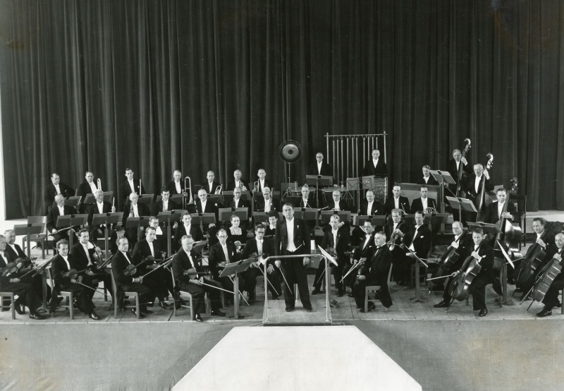 Aarhus By-orkester ca. 1945